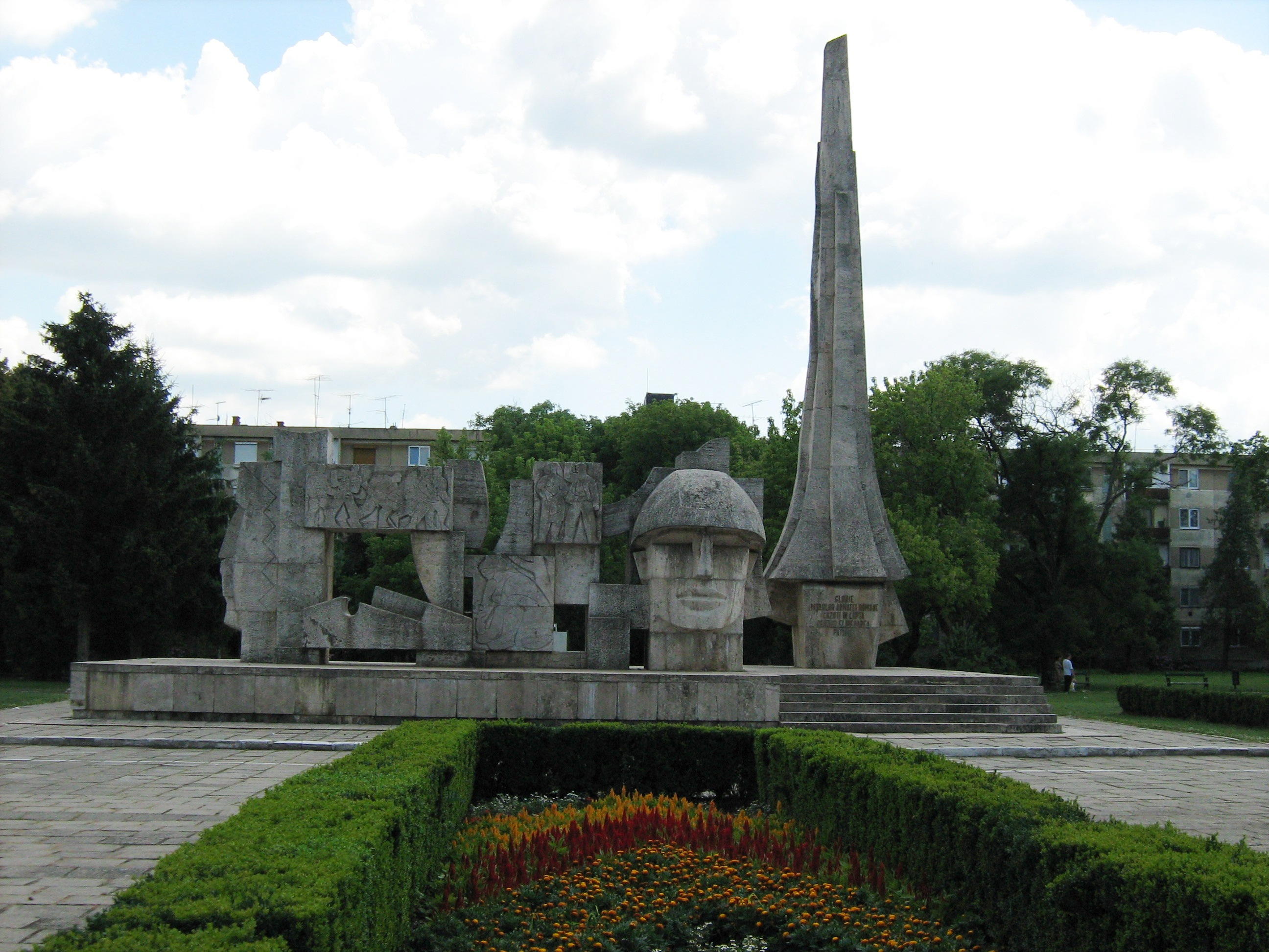 Monumentul ostașului român